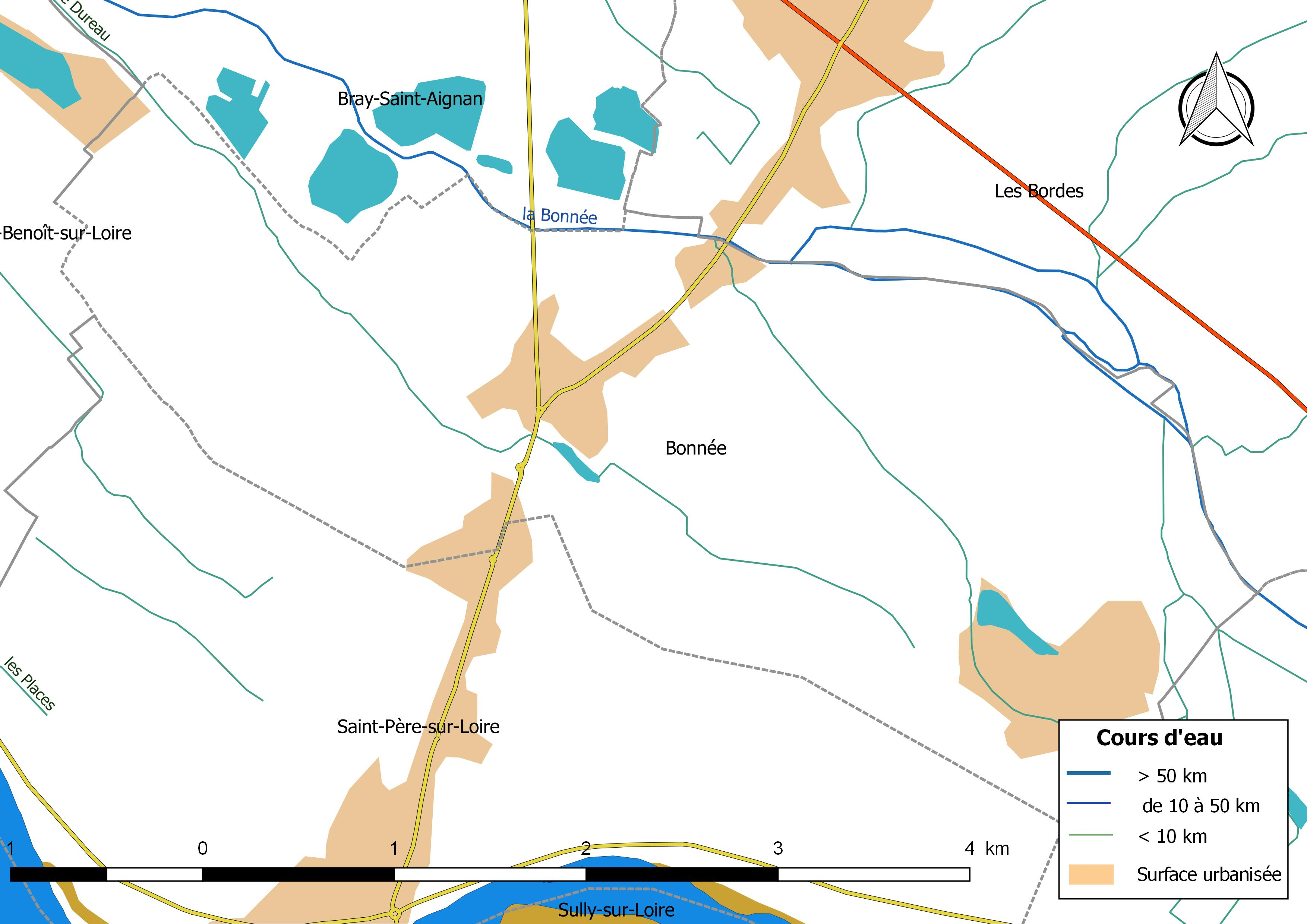 Carte du réseau hydrographique de la commune de Bonnée (France).